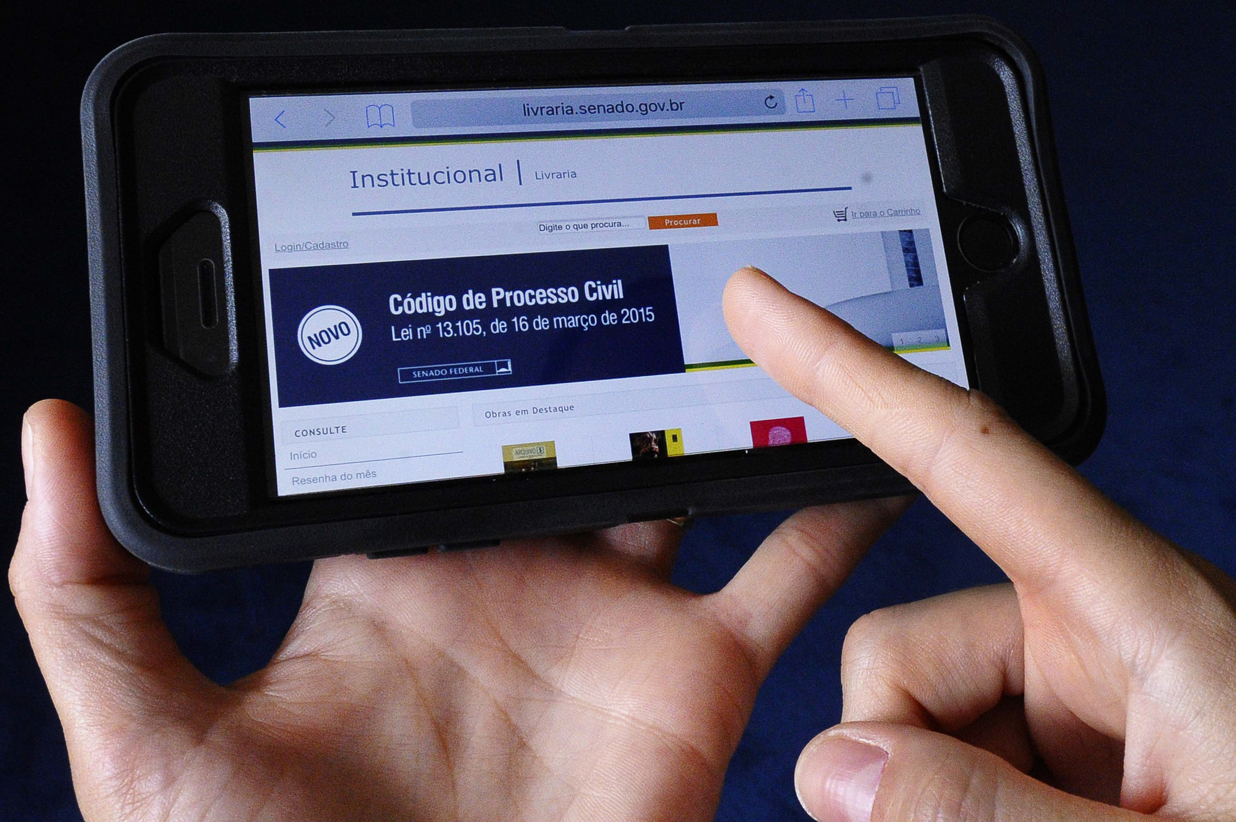 O Senado publicou este ano 19 títulos em formato digital. São livros que reproduzem textos legais, como a Constituição Federal e o Código Penal, e podem ser baixados gratuitamente. O Código de Processo Civil e Legislação Correlata é a publicação que teve o maior número de downloads, 6.396 de janeiro de 2013 até o último dia 18. Segundo o chefe do Serviço de Publicações Técnico-Legislativas, Raphael Rocha Melleiro, o objetivo é dobrar, em um ano, as edições que podem ser lidas em tablets, celulares e computadores. A coordenadora do Núcleo de Ações Socioambientais, Andréa Bakaj, afirma que as publicações digitais estão alinhadas tanto com a Carta de Compromissos da Casa quanto com o Plano de Gestão de Logística Sustentável. — Com os e-books, é possível economizar muitos recursos, e também serve como incentivo para a leitura de livros digitais. Além disso, há a questão da sustentabilidade, já que a geração de resíduos é minimizada. É importante lembrar que esses livros também são uma forma de garantir acessibilidade a pessoas com deficiência visual — destacou. Os títulos em formato digital estão disponíveis na Livraria Virtual do Senado. Foto: Edilson Rodrigues/Agência Senado